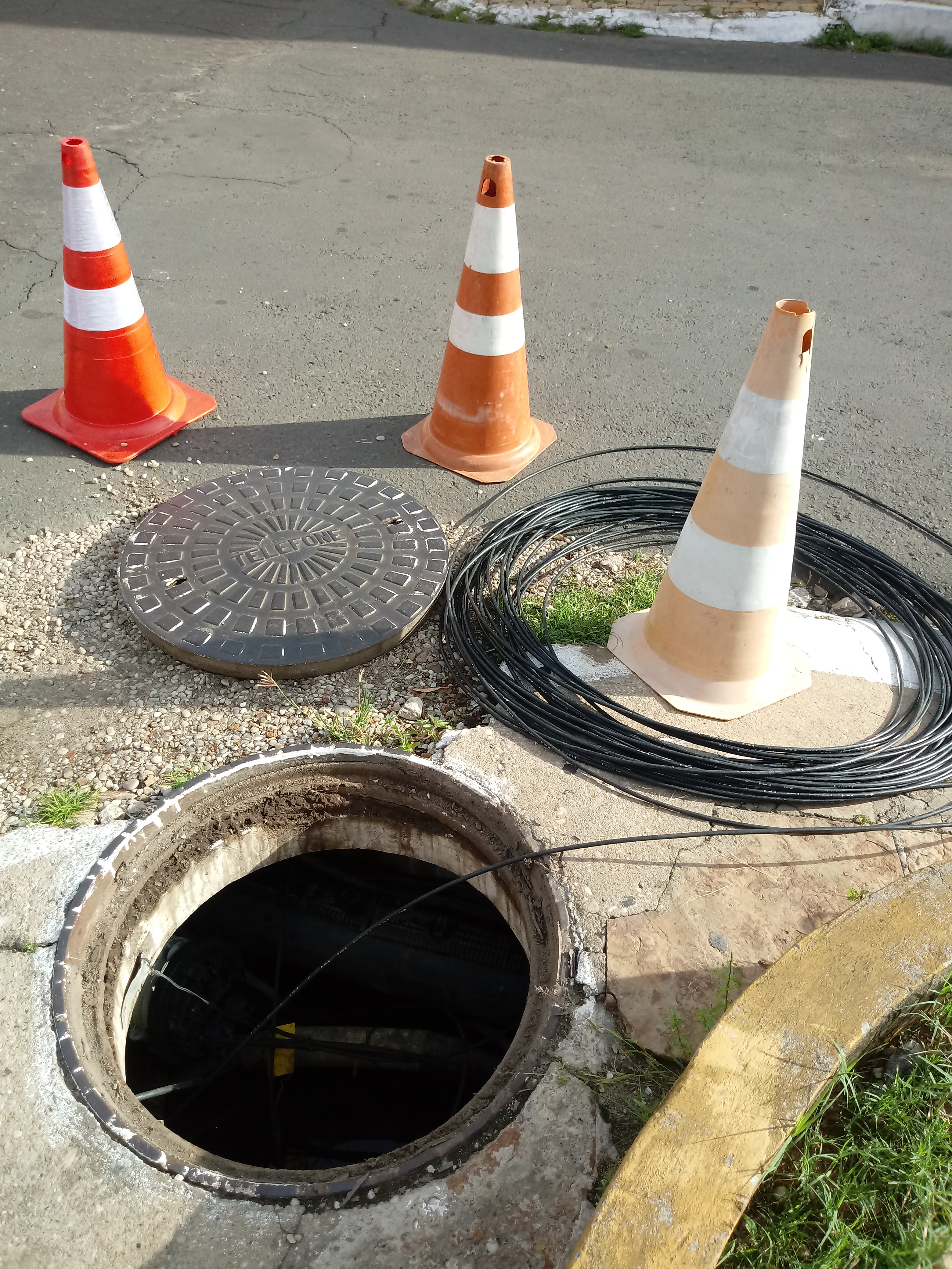 Poço de visita na rua Siqueira Campos em Campo Maior.